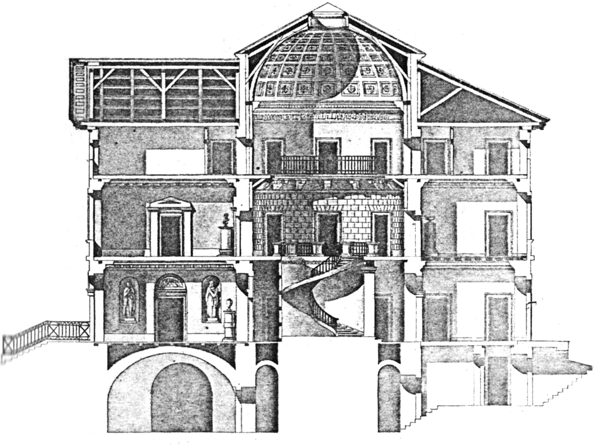 Plan von Schloss Schomberg bei Eppingen (1820)